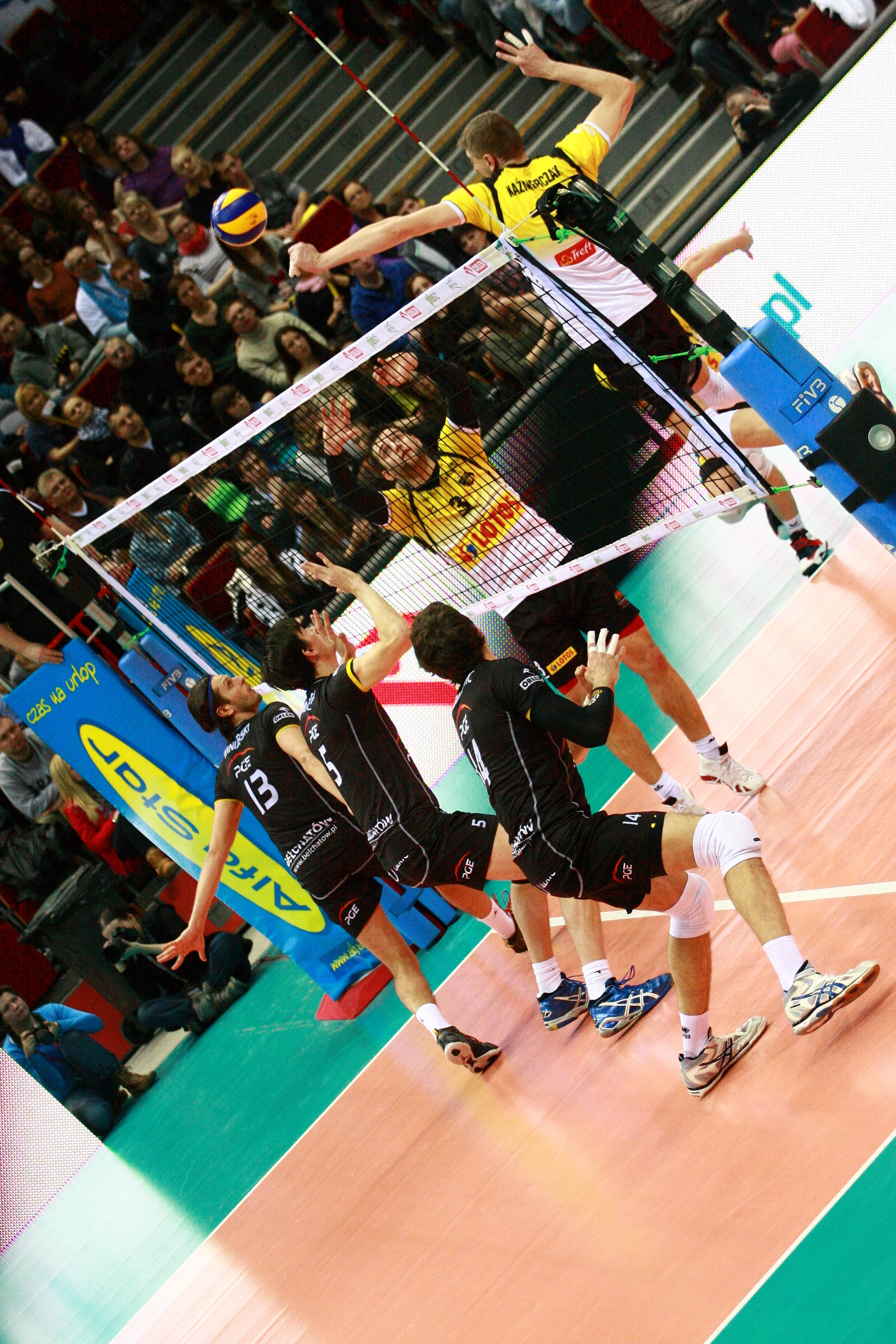 Lotos Trefl Gdańsk vs Skra Bełchatów